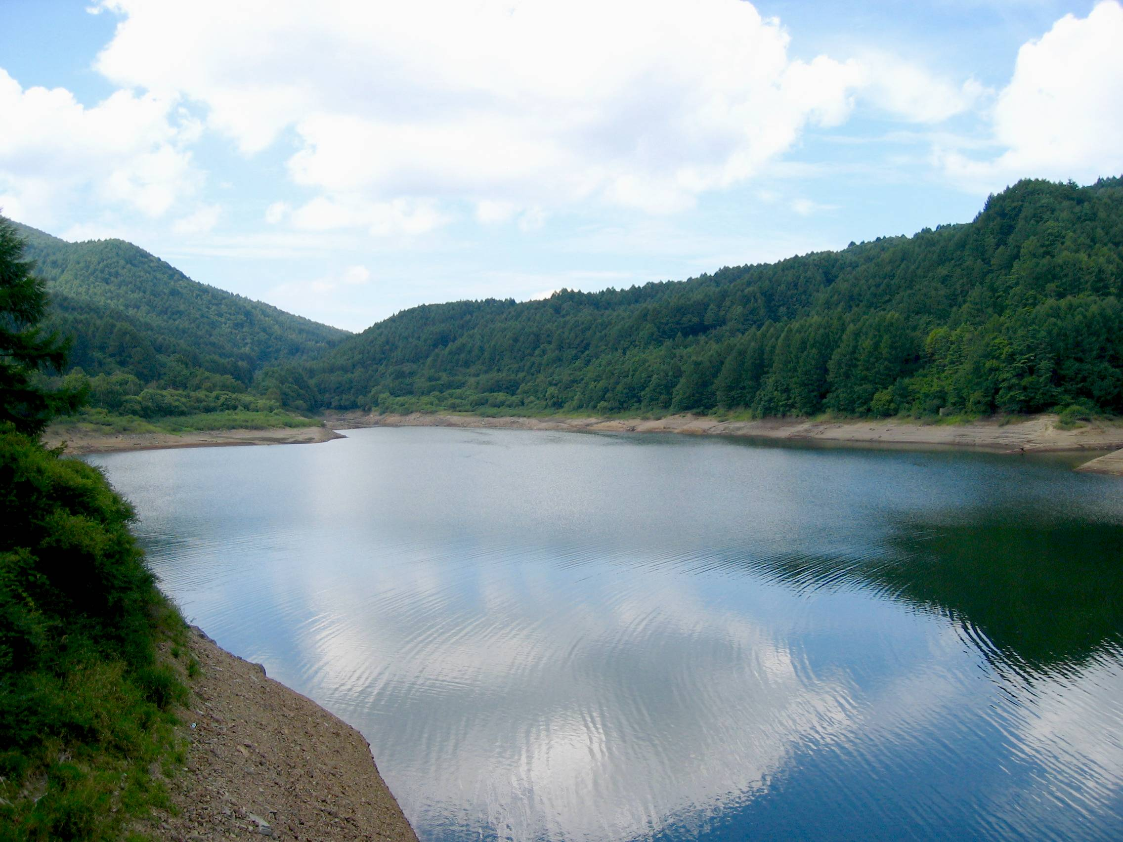 Sugadaira Dam (菅平ダム) makes Lake Sugadaira (菅平湖).